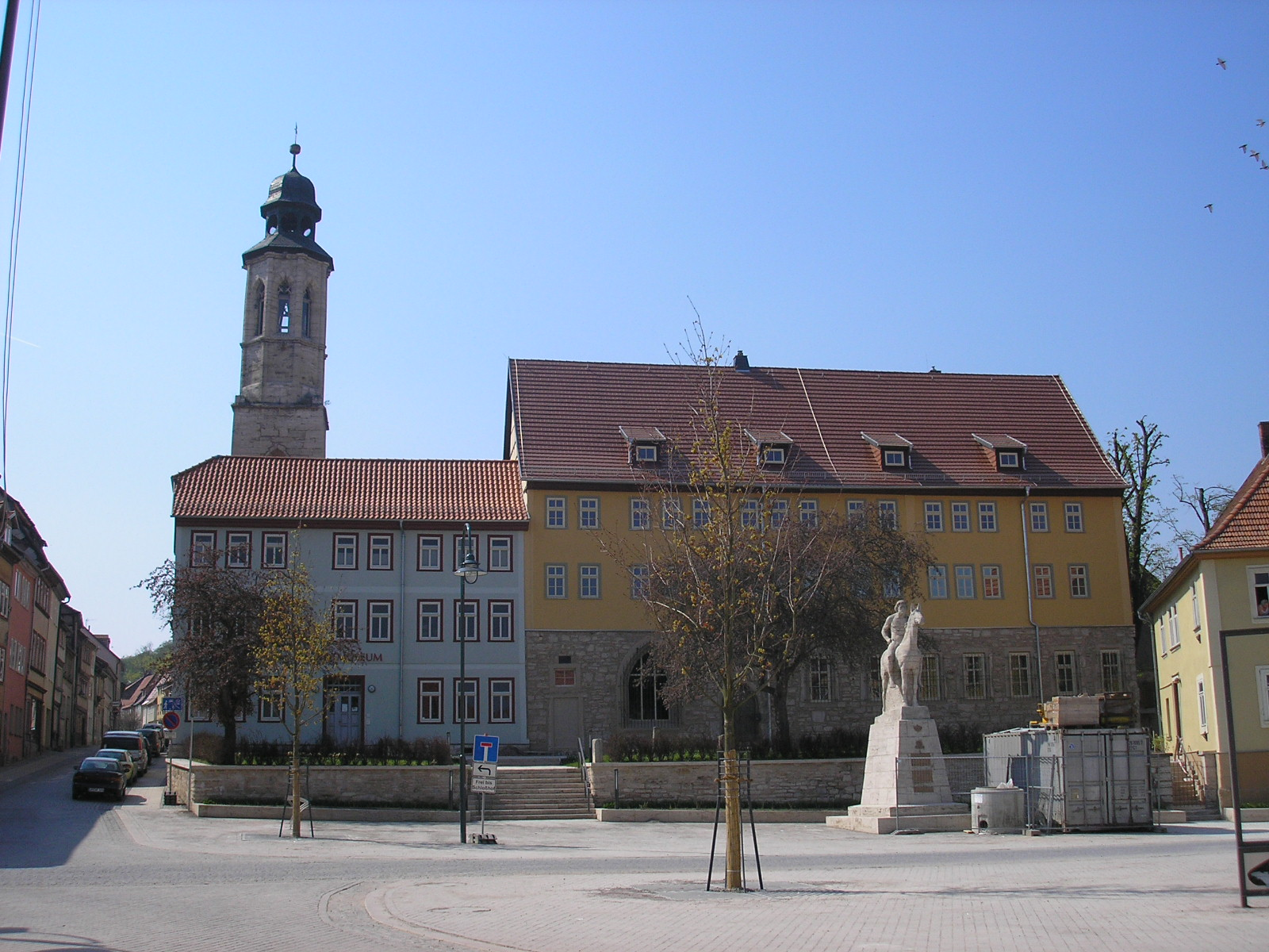 Das Stadtmuseum im Augustinerkloster in Bad Langensalza (Thüringen). Das Reiterstandbild davor wurde zur Erinnerung für die im Ersten Weltkrieg gefallenen Soldaten des Thüringischen Ulanen-Regiments Nr. 6 errichtet.